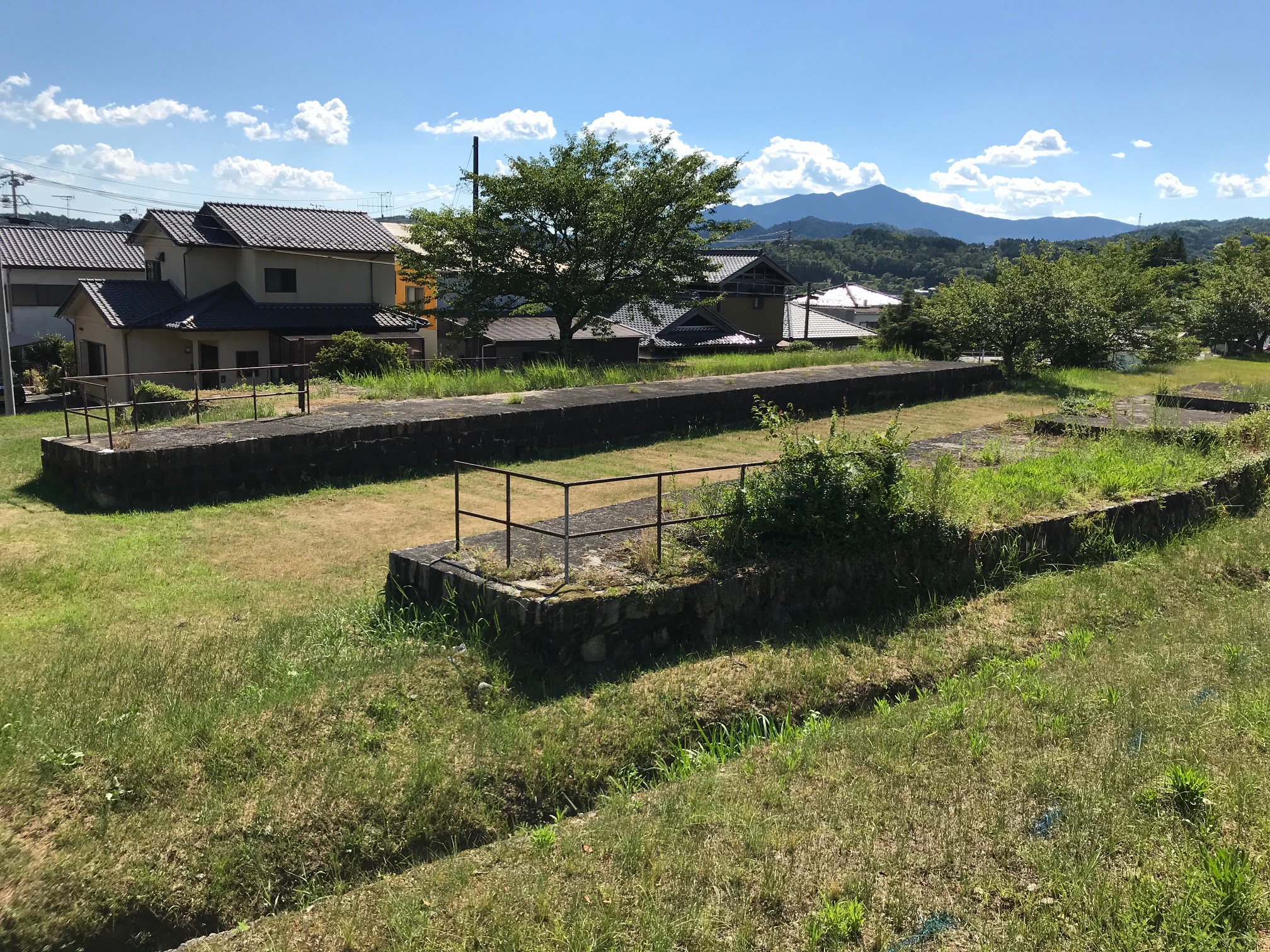 File:並松駅跡.jpg